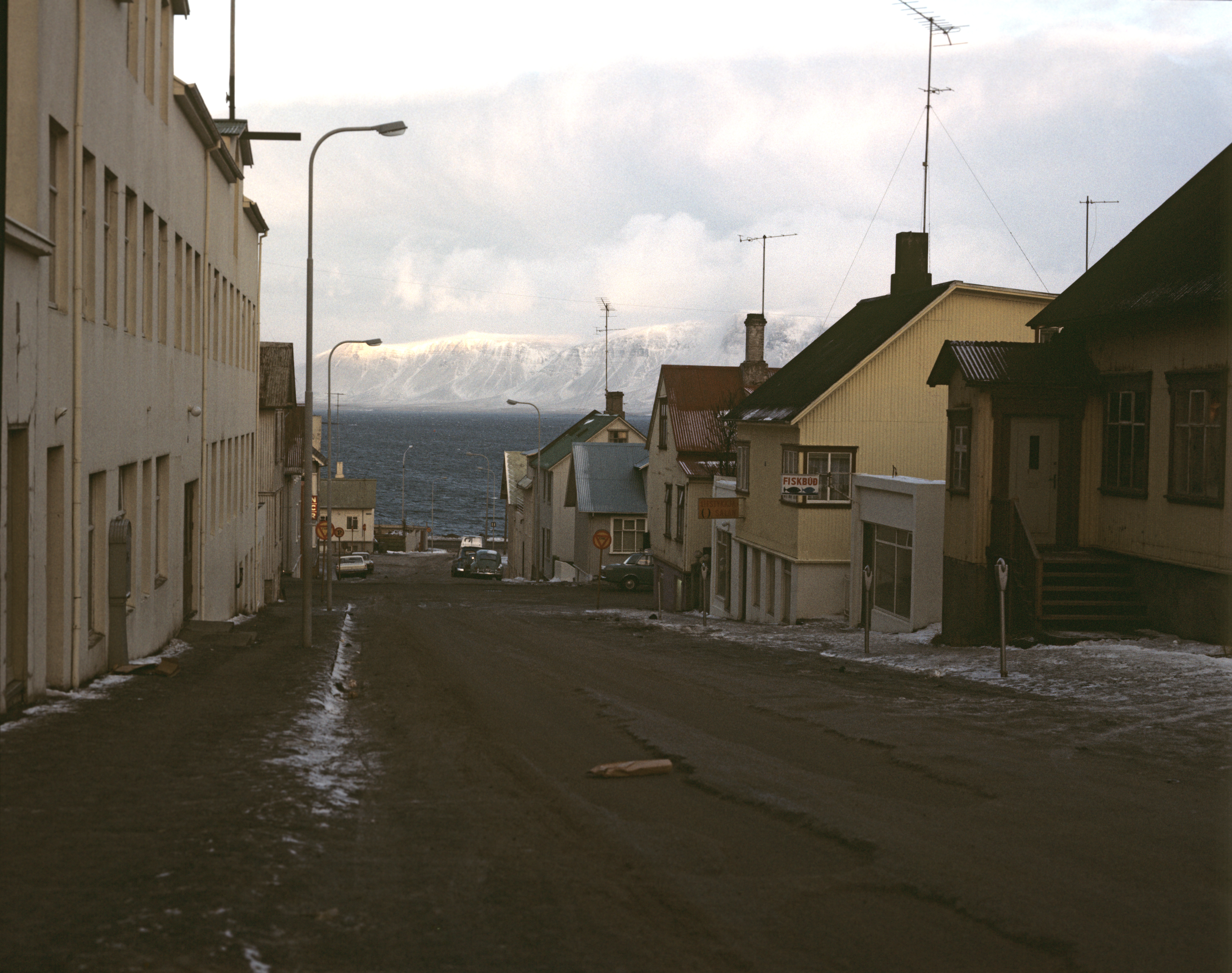 Frakkastígur